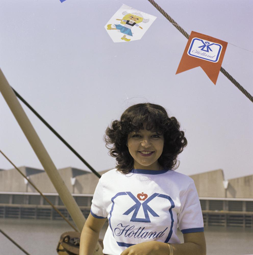 De Marokkaanse zangeres Samira Bensaïd tijdens een fotosessie voor het Eurovisie Songfestival 1980